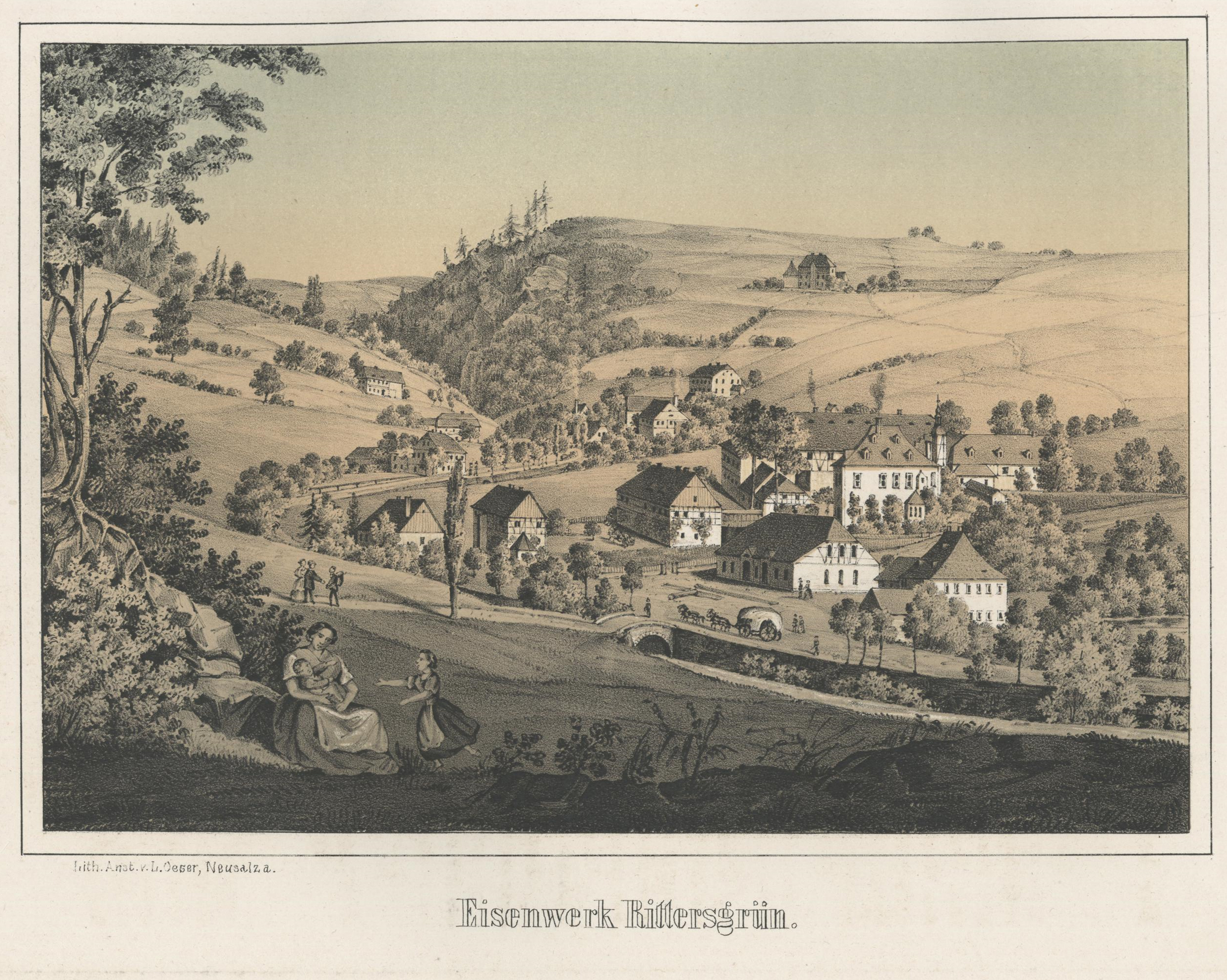 Eisenwerk Rittersgrün aus: Album der Sächsischen Industrie Zweiter Band